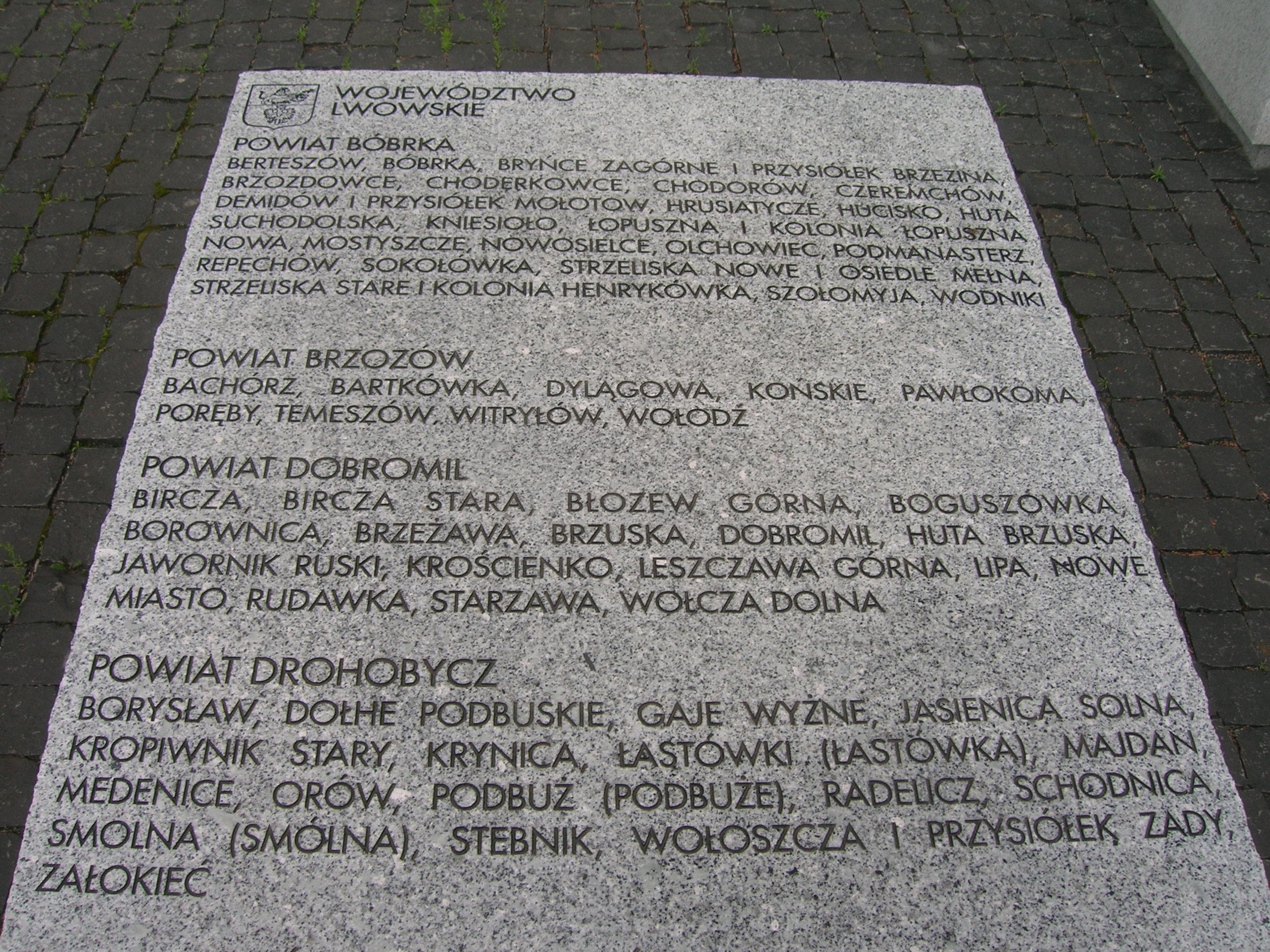 tablica powiaty Bóbrka Brzozów Drohobycz